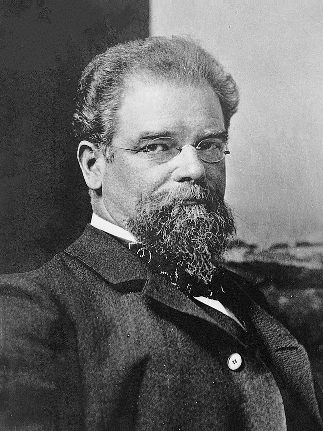 Max Klinger by Nicola Perscheid